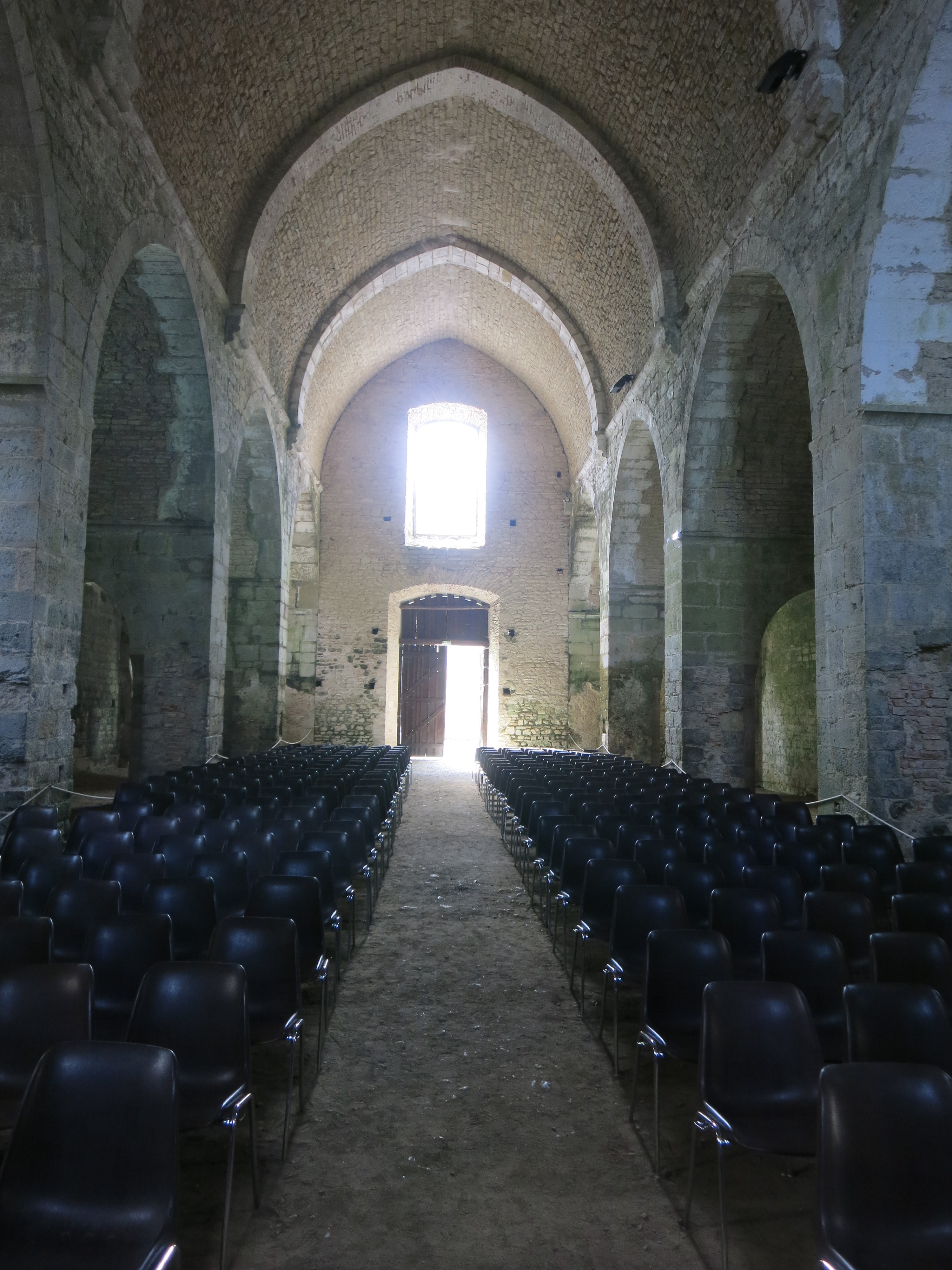 Abbaye d'Escaladieu (nef de l'abbatiale)